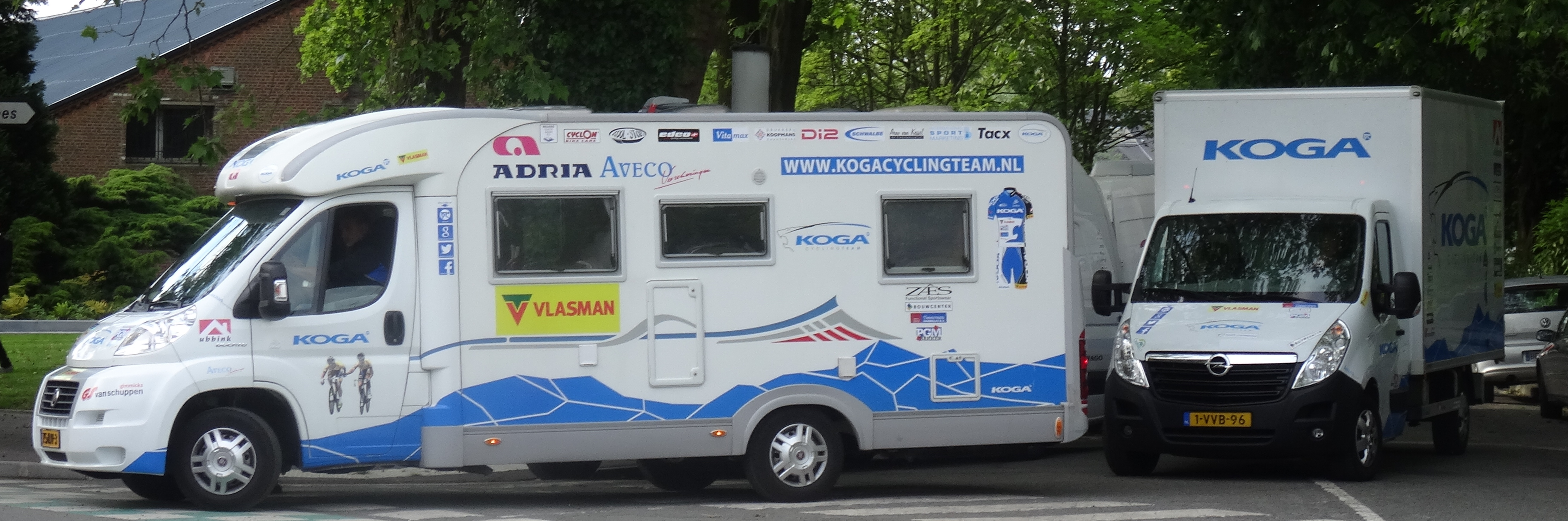 Reportage photographique réalisé le vendredi 23 mai 2014 à l'occasion de l'arrivée de la première étape du Paris-Arras Tour 2014 devant la citadelle d'Arras, Pas-de-Calais, Nord-Pas-de-Calais, France.